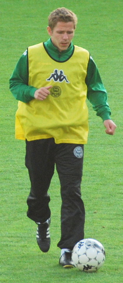 Fodboldspilleren Christian Olsen fra Viborg FF. Her i 1. divisionskampen mod Hobro IK på Viborg Stadion.